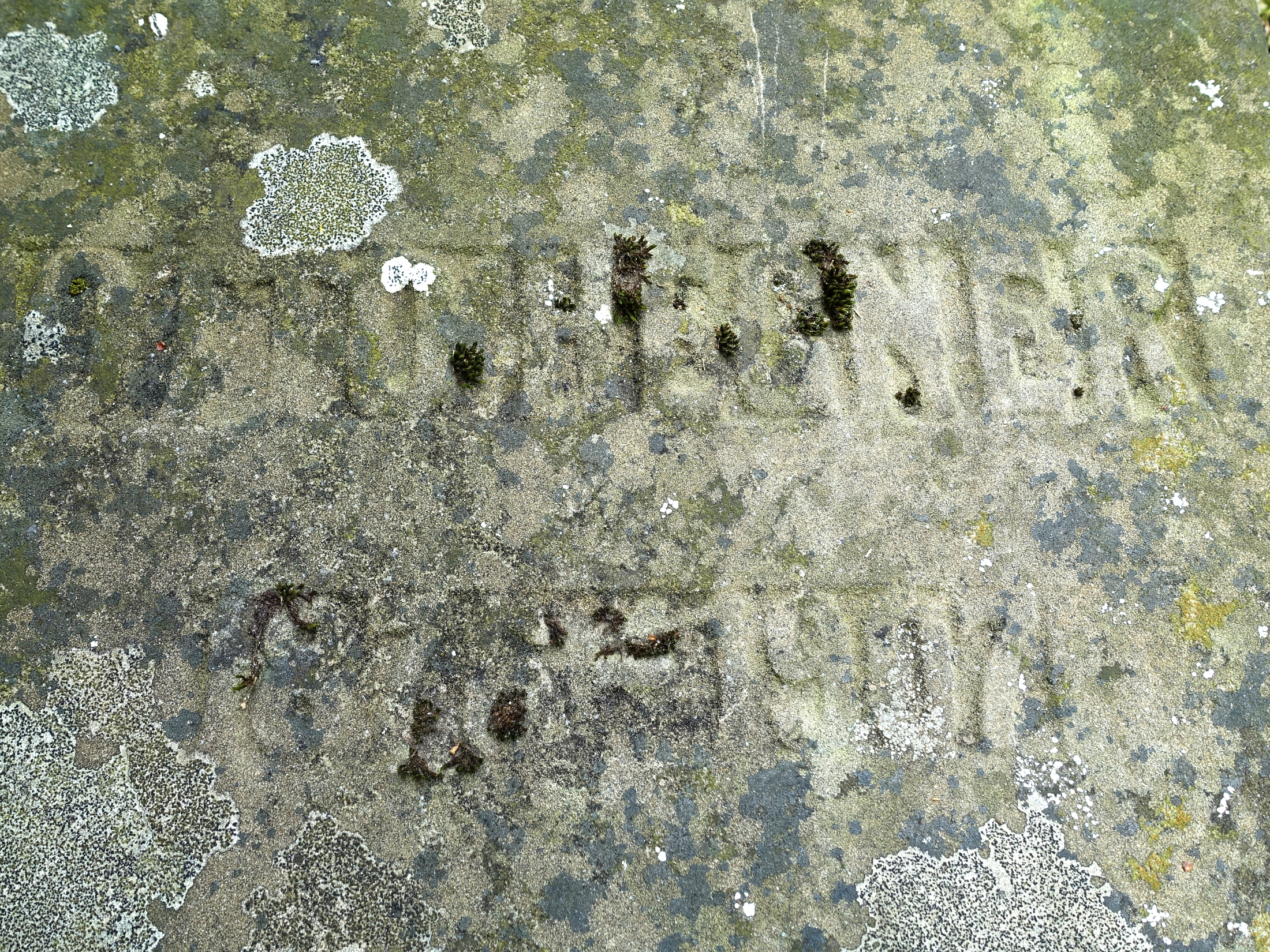 Otto Hegner (1876–1907) Komponist. Grab auf dem Friedhof von Langenbruck, Basel-Land, Schweiz. Seine Frau Marie, genannt Armande und ihr späterer Ehemnann, der Komponist Paul Juon (1872–1940) ist auch auf den Friedhof begraben.